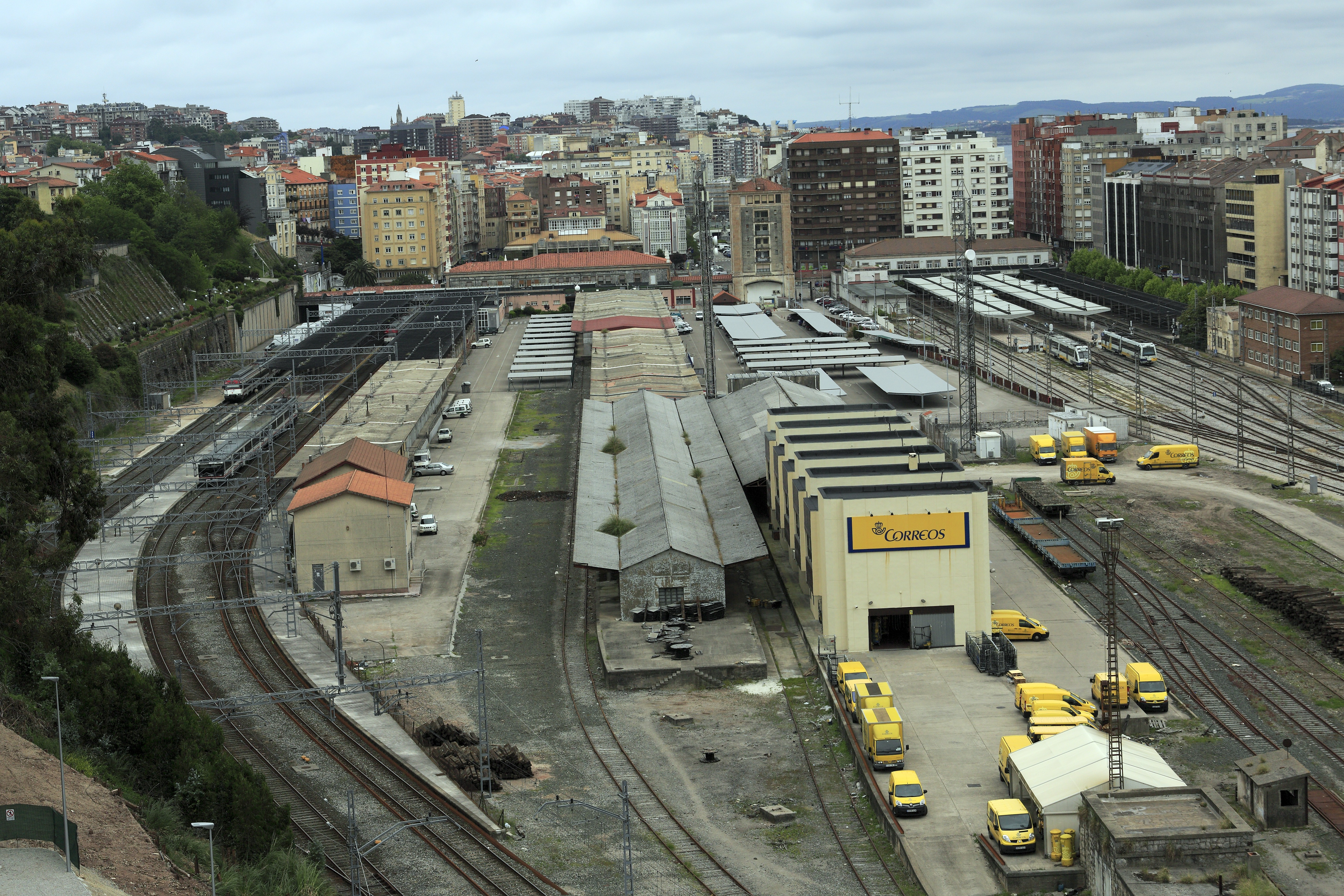 Links Breit-, rechts Meterspur. Die alte Renfe ist hier zwar der kleinere Betrieb, doch sind die Breitspurbahnsteige, der möglichen Zuglänge angepasst, deutlich länger. In Bildmitte liegen die Postbahnsteige, doch auch in Spanien gibt es keine Bahnpostbeförderung mehr.